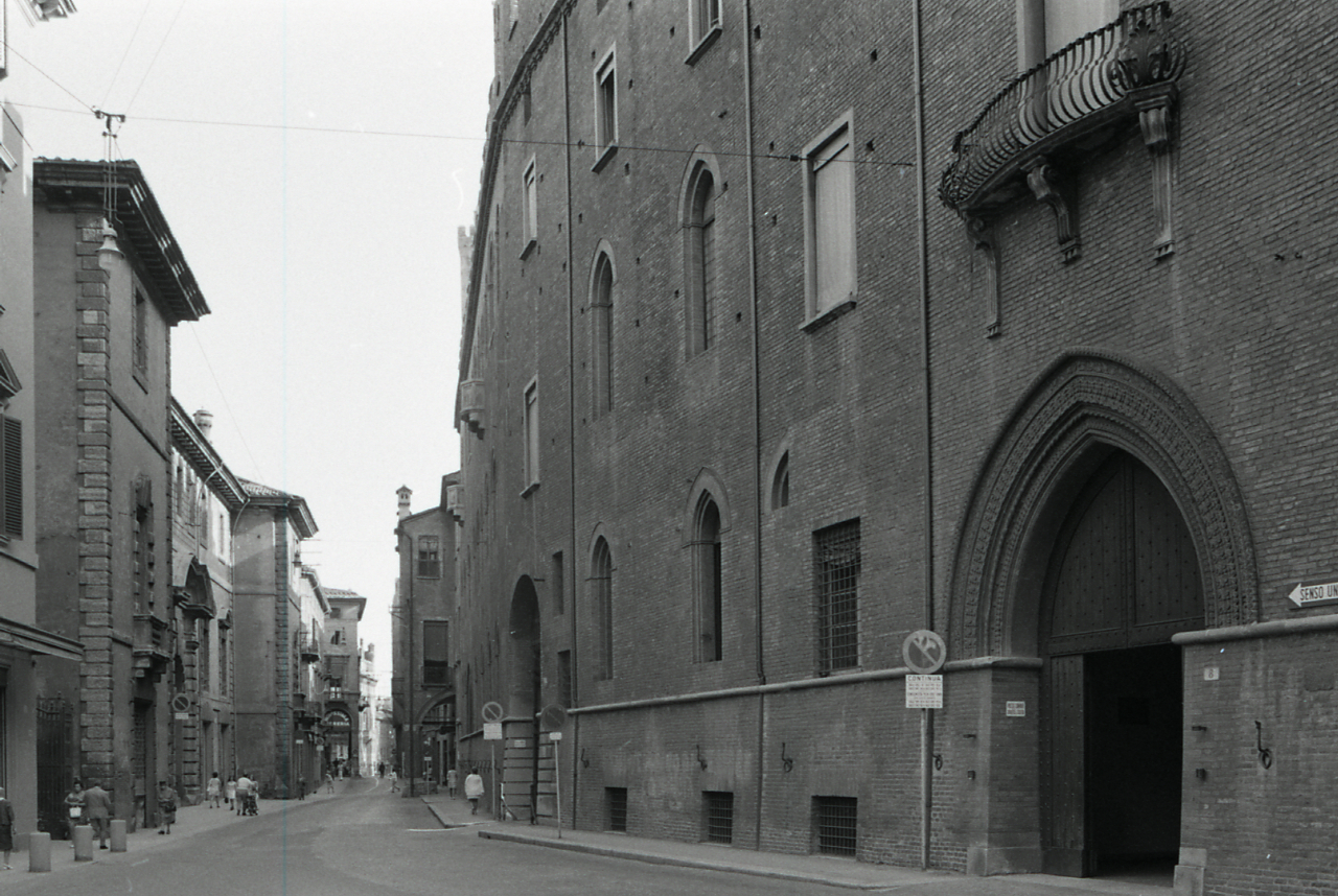 Servizio fotografico : Bologna, 1970 / Paolo Monti. - Strisce: 7, Fotogrammi complessivi: 38 : Negativo b/n, gelatina bromuro d'argento/ pellicola ; 35 mm. - ((I fotogrammi hanno una doppia numerazione. . - Sul portanegativi: Nikon HP4. - Fonte: Agenda di Paolo Monti: Monti - Agenda 1970 (1970), presso Archivio Paolo Monti